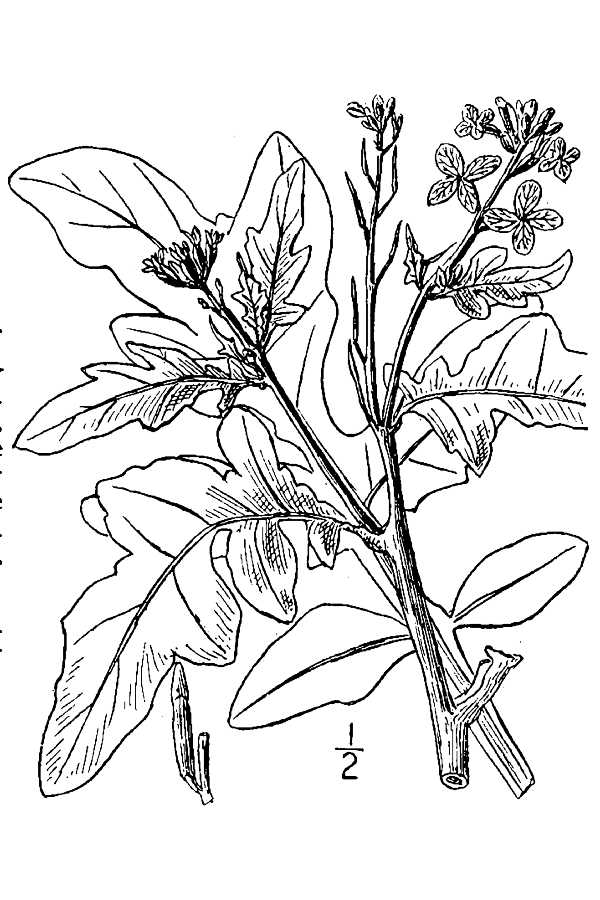 drawing of Eruca sativa (Eruca vesicaria ssp. sativa)